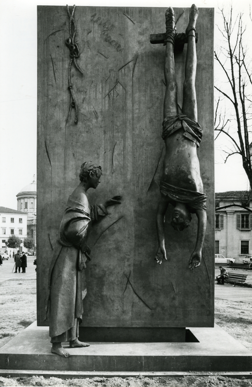 Bergamo. Giacomo Manzù, "Monumento al partigiano" (1977), in Viale Papa Giovanni XXII. Servizio fotografico : Bergamo, 1981 / Paolo Monti. - Stampe: 3 : Positivo b/n, gelatina bromuro d'argento/ carta, 24x30. - ((Al verso delle stampe manoscritto numero di negativo corrispondente: 3396/9, 3639/35, 3639/38. Sul coperchio della scatola manoscritto a pennarello nero: "Bergamo/ Architettura". - Occasione: Documentazione per la pubblicazione: Fumagalli Alberto, "Bergamo: origini e vicende storiche del centro antico", Milano, Rusconi immagini, 1981. - Monografia di Fumagalli, Alberto: Bergamo: origini e vicende storiche del centro antico (1981). - Fonte: Agenda di Paolo Monti: Nikon Leika 3001-/ Monti 1978 (1978-1982), presso Archivio Paolo Monti. - Fonte